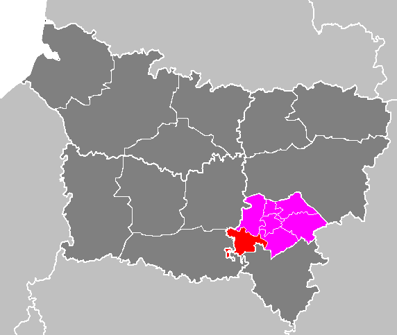 Maps of arrondissements and cantons of France: Arrondissement de Soissons - Canton de Villers-Cotterêts.PNG